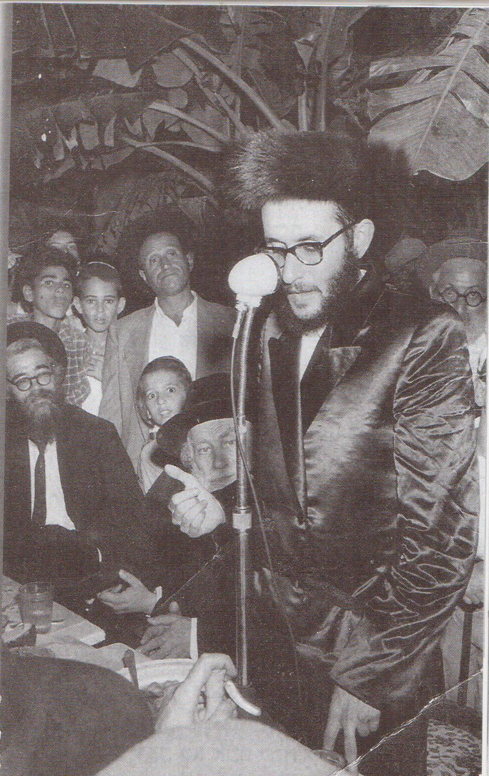 תמונה של הרב היום נישואיו